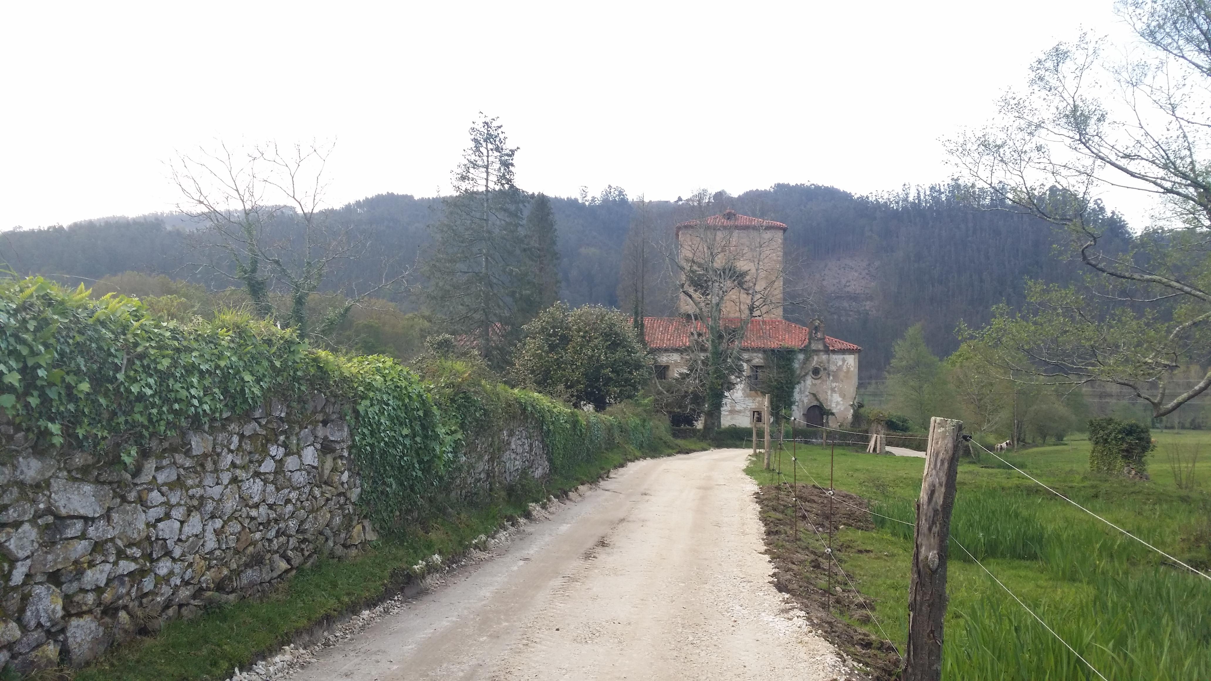 Vista delantera de la Torre de Arango, desde el camino de entrada. Enfocado en la zona sur